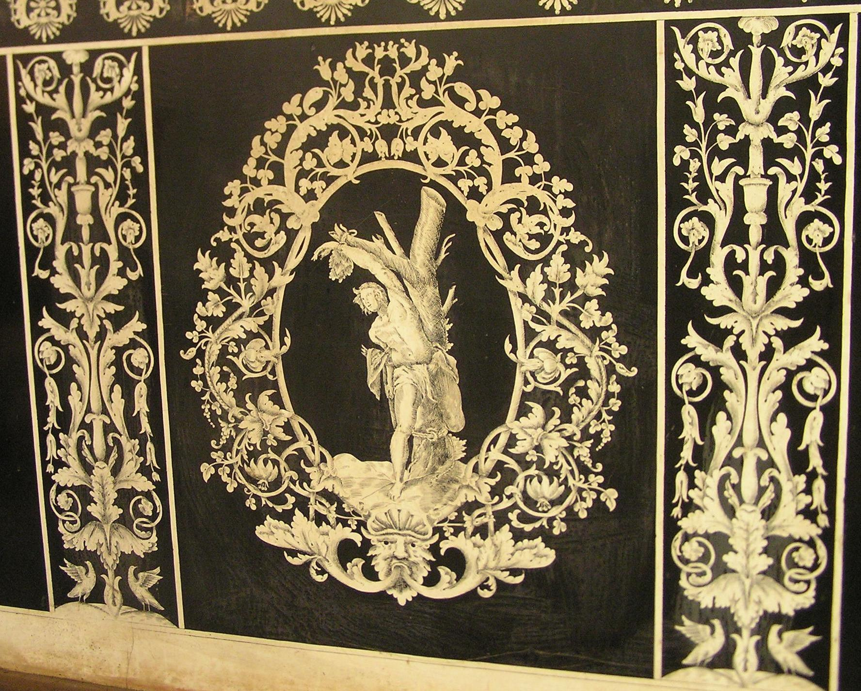 Paliotto d'altare in scagliola della chiesa di Santa Maria della Pomposa.